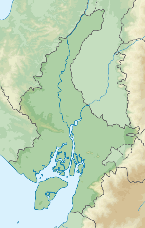 Carte topographique de la province de Guayas, Équateur LImits N = -0.728068 S = -3.224785 W = -80.642992 E = -79.049497